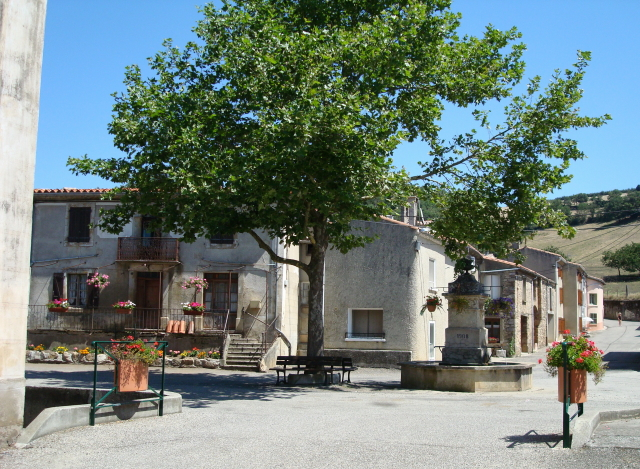 Place et fontaine publique, Missègre